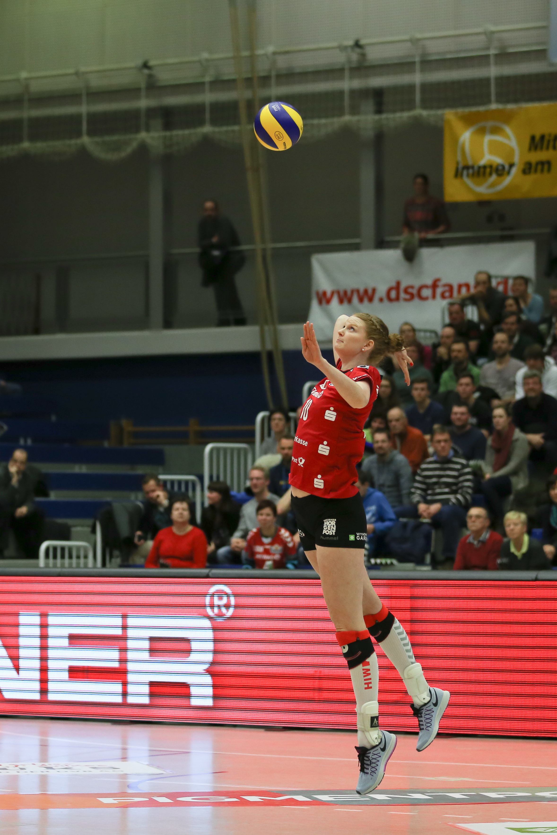 Volleyballspiel in der 1. Bundesliga des Dresdner SC gegen Aurubis Hamburg in der Margon Arena in Dresden.